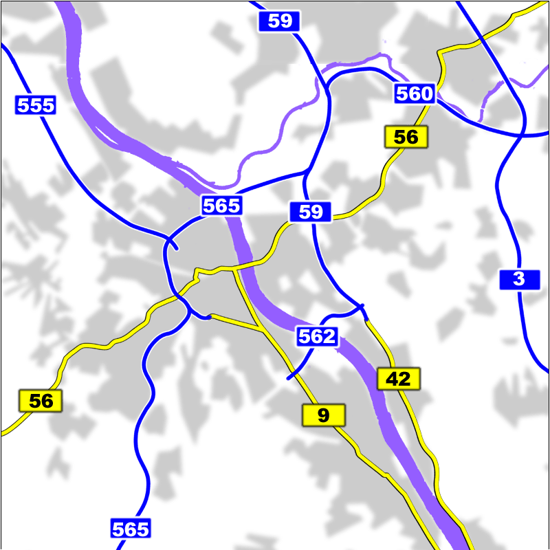 Fernstraßen im Raum Bonn, selbst gezeichnet